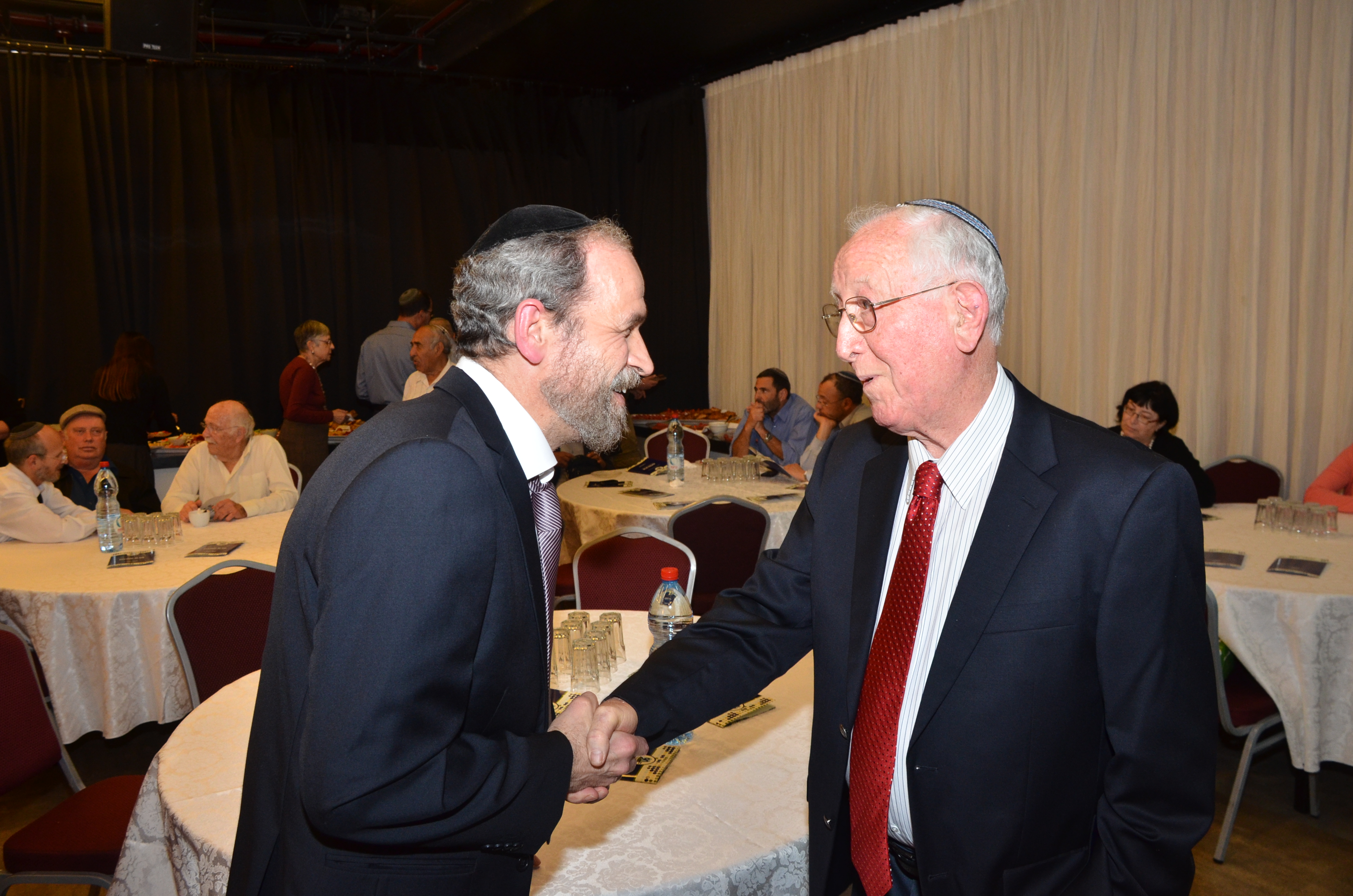 זאב פרנק ופרופ' נוח עמינוח בטקס פרס עמינוח ביום ל' ניסן ה'תשע"ג בבית ציוני אמריקה תל-אביב